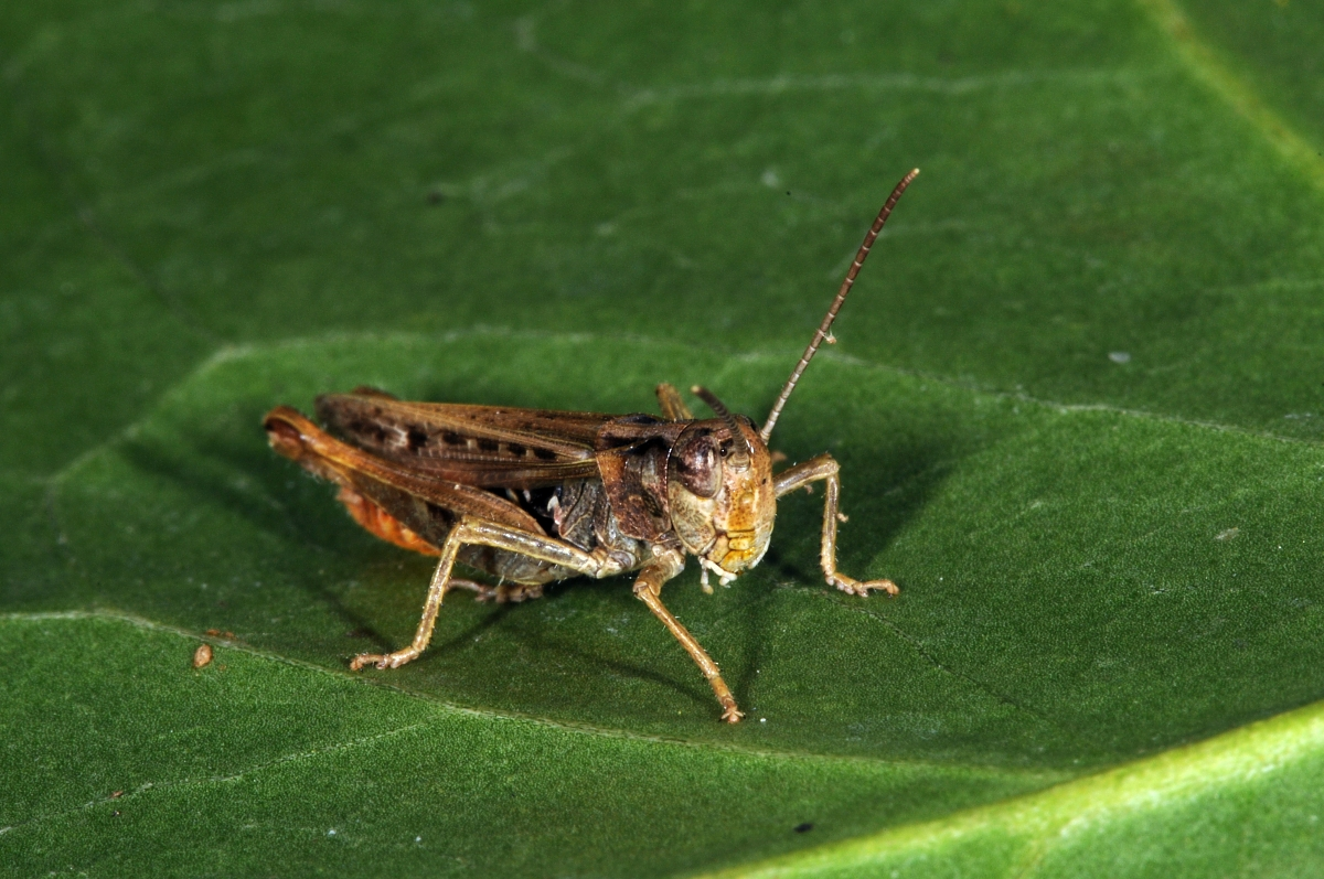 Omocestus haemorrhoidalis, Männchen, Mainzer Sand, Rheinland-Pfalz, Deutschland